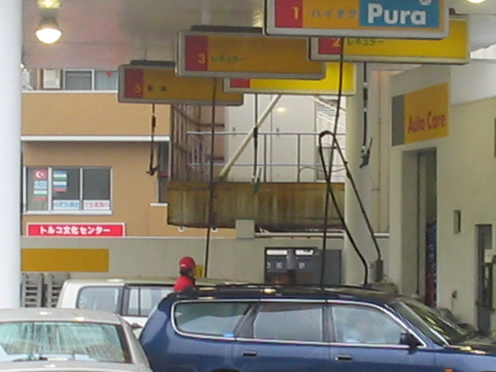 tankstation Japan met pompen in het dak